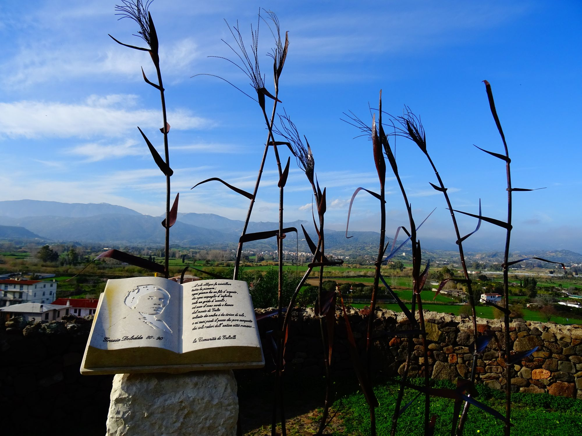 Belvedere di San Pietro a Galtellì. Scultura che ricorda il romanzo "Canne al vento".